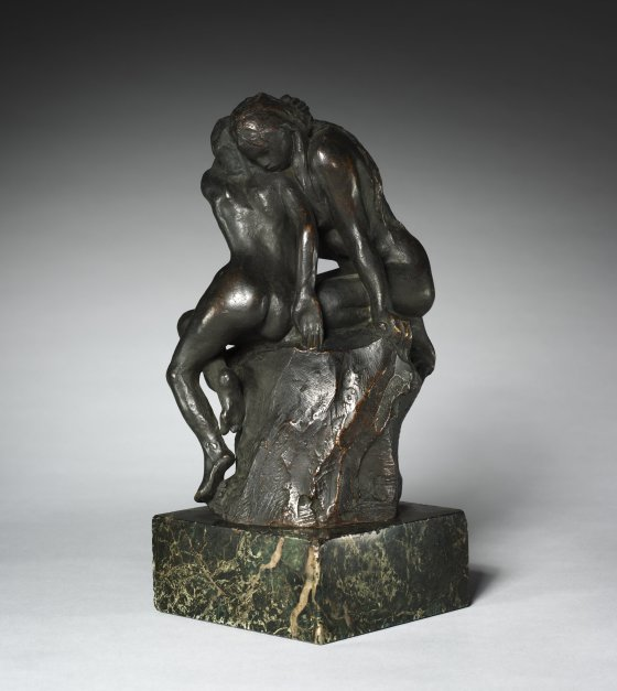 Giovane Ragazza che confida il suo segreto, 1889 eseguito da Auguste Rodin per Albert Pontremoli, attualmente conservata presso il Cleveland Museum of art